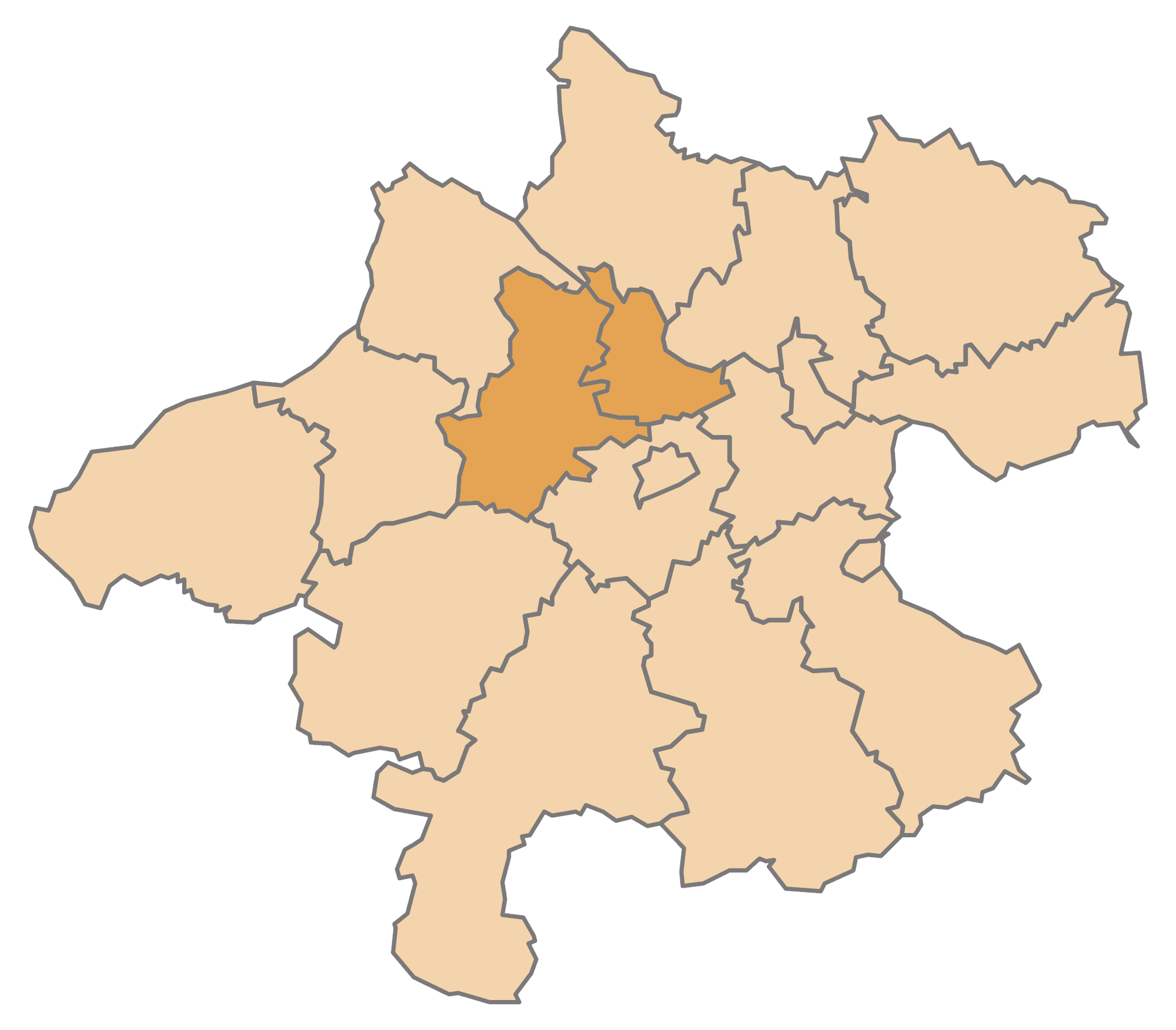 Karte der pol. Bezirke und Statutarstädte in Oberösterreich; Eferding und Grieskirchen markiert